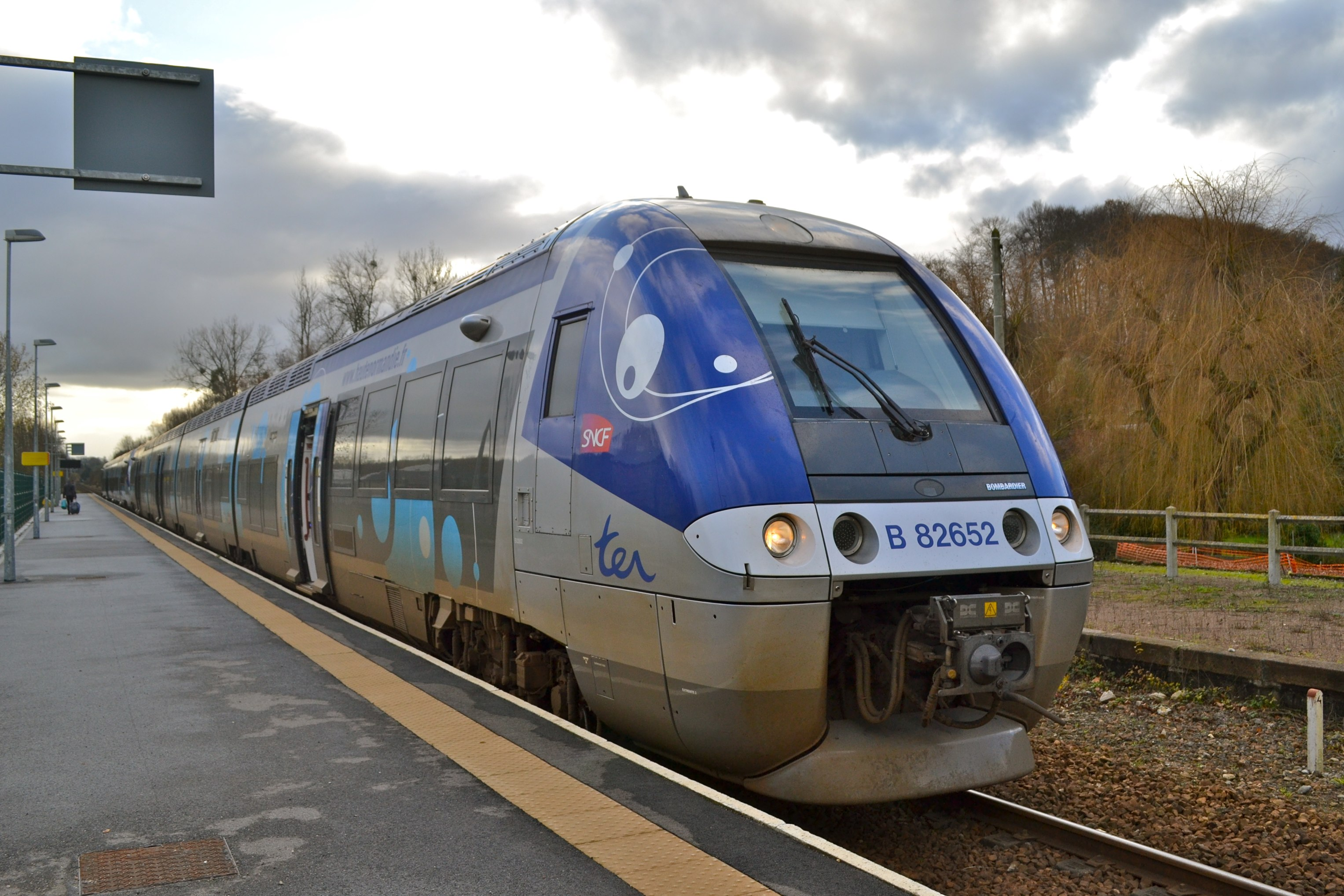 treinstel B 82651/2 van TER Haute Normandie in St Aubin sur Scie